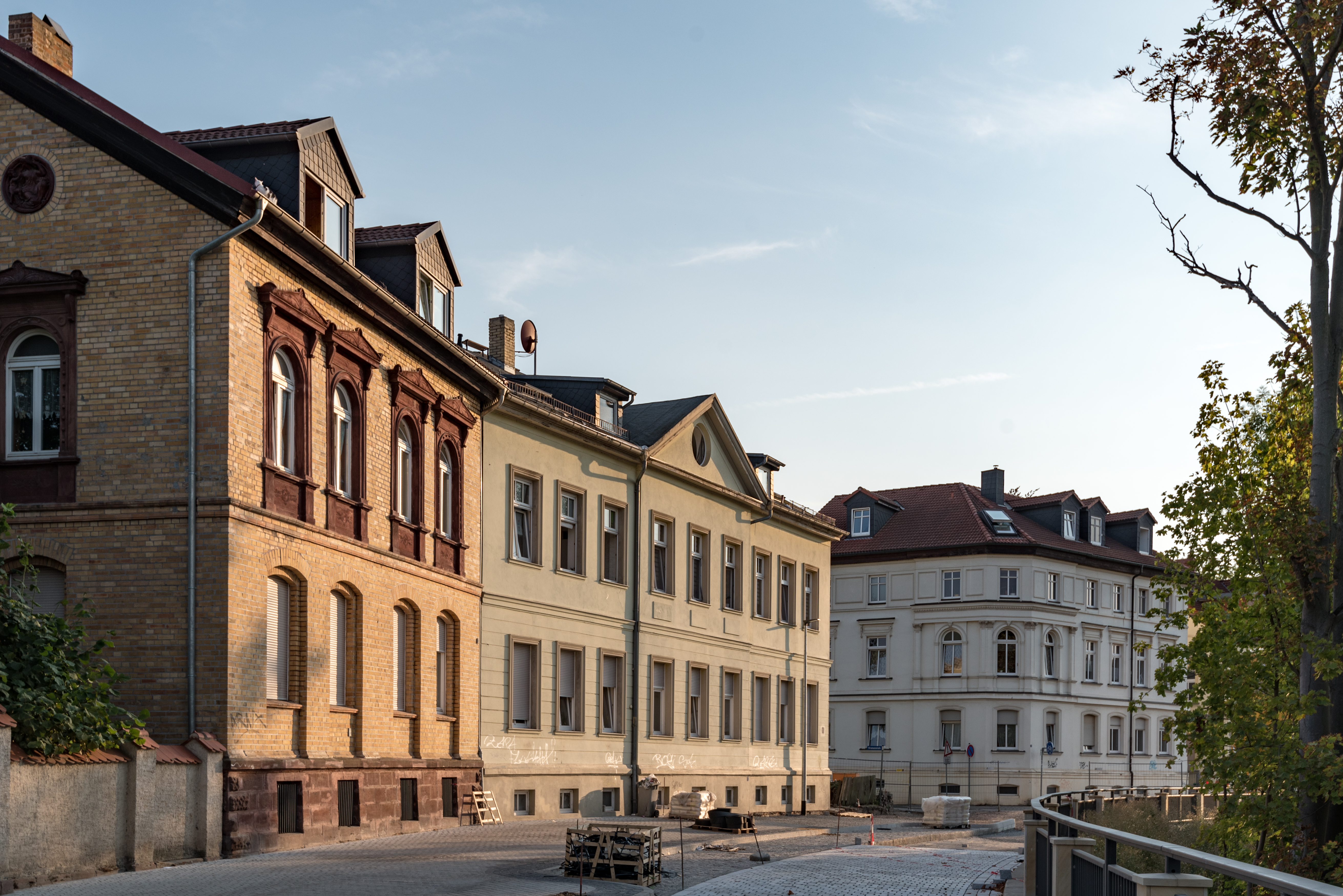 Weißenfels, Große Deichstraße 12